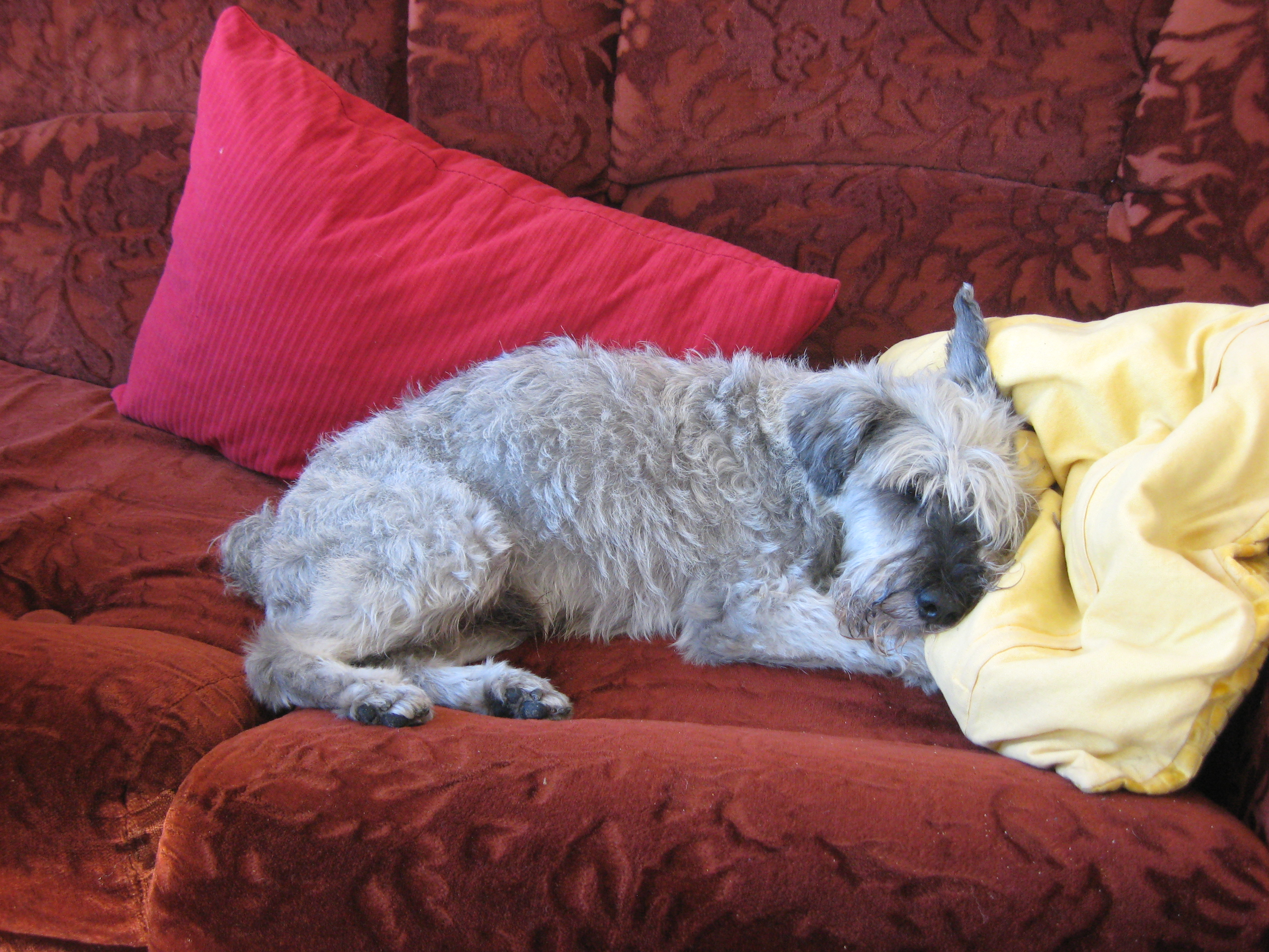 Alter Zwergschnauzer beim Ruhen (wache Aufmerksamkeit im Zustand der Entspannung) Datum: 22.09.2010 Urheber: Michael Pfeiffer alias Benutzer:Gordito1869 - rechtmäßiger Halter des im Jahr 2011 verstorbenen "Jacki v. Rattenfänger" (VDH95ZS ..021207) - (Sohn der Yenni v. Rattenfänger ( .) u.d. Max v. Hinterhof) - AHNENTAFEL: Großeltern: Raudi v. Höhlerberg, Wespe v. Hinterhof, Kox v. Hinterhof, Lady v. Rattenfänger / Urgroßeltern: Gauner v. d. Barbarossastadt, Yana Maskottchen, Aiko v. Großen Busch, Jule v. Hinterhof, Adrian Maskottchen, Yvonne v. Hinterhof, Wex v. Wittbruch, Baffi v. Rattenfänger Quelle: privates Fotoalbum des Urhebers